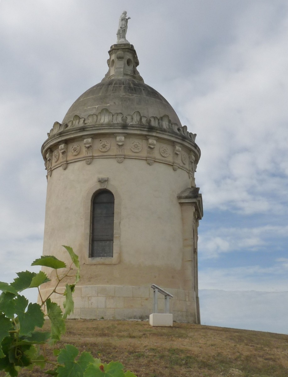 Chapelle Notre-Dame-des-Champs, Mosnac, Charente-Maritime, France